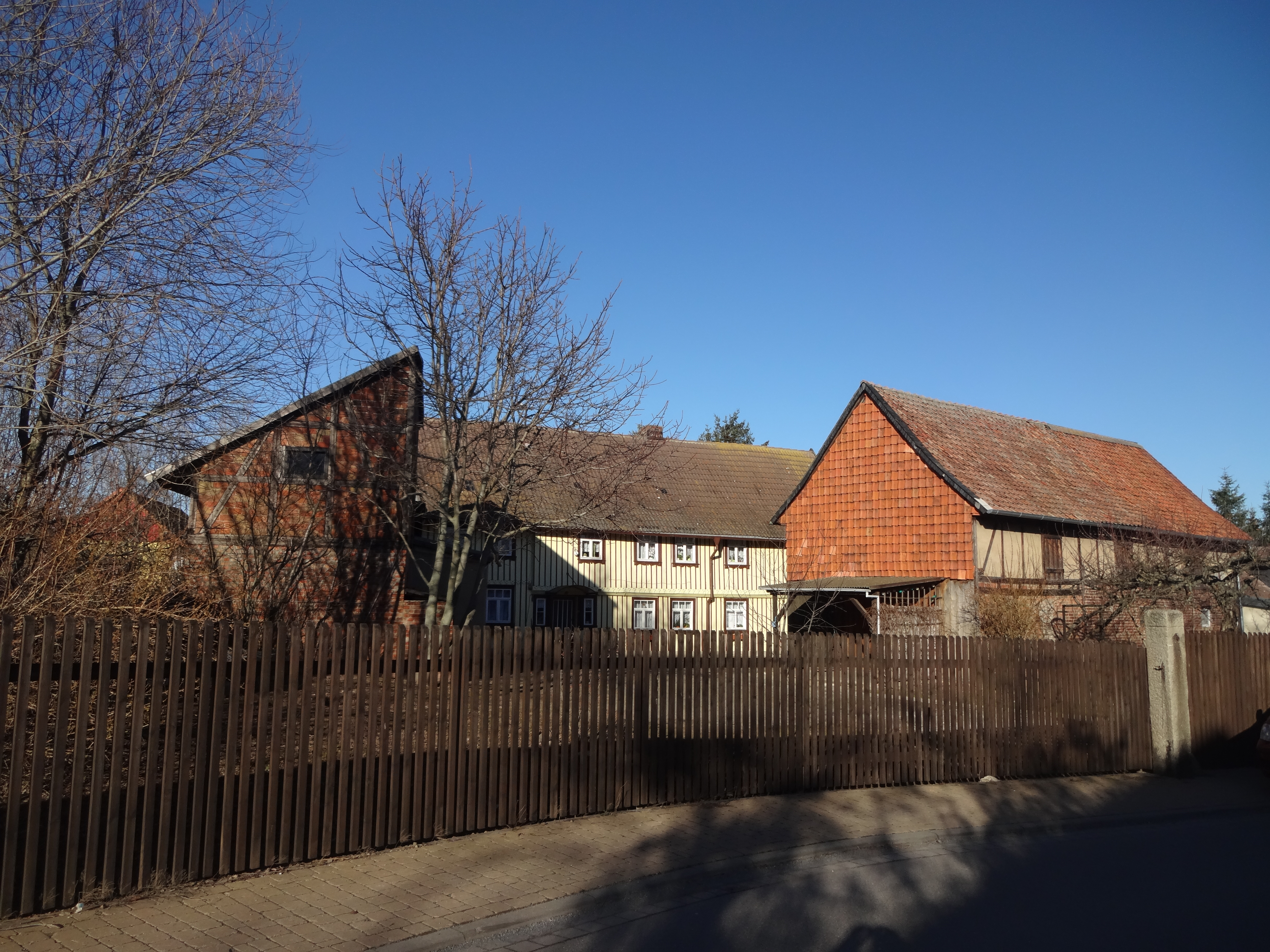 denkmalgeschützter Bauernhof im Oehrenfelder Weg 10 in Darlingerode